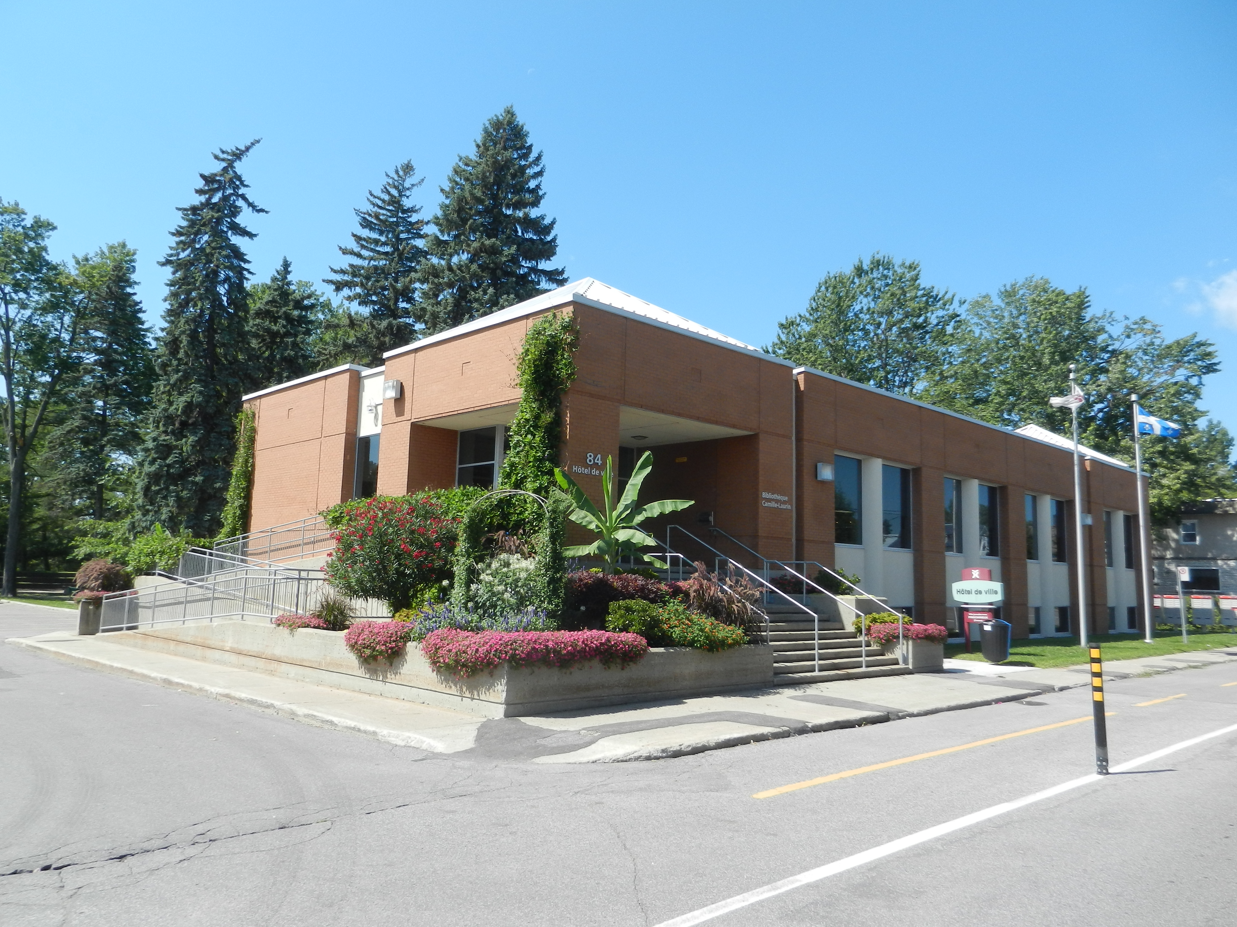 Hôtel de ville et bibliothèque